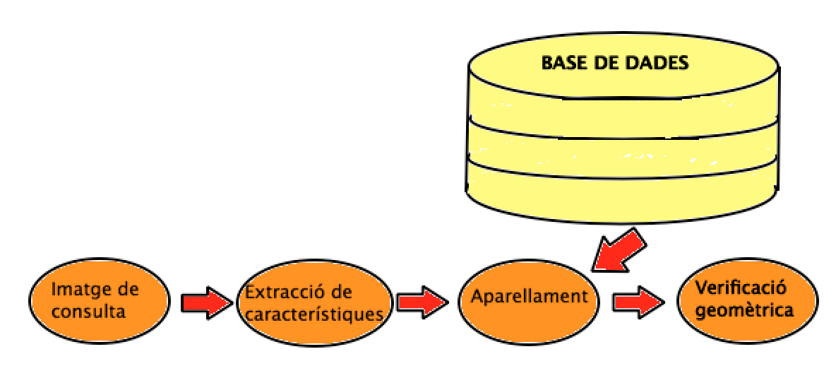 Representació del model de la cadena que es segueix per fer una cerca de contingut a partir d'una imatge.